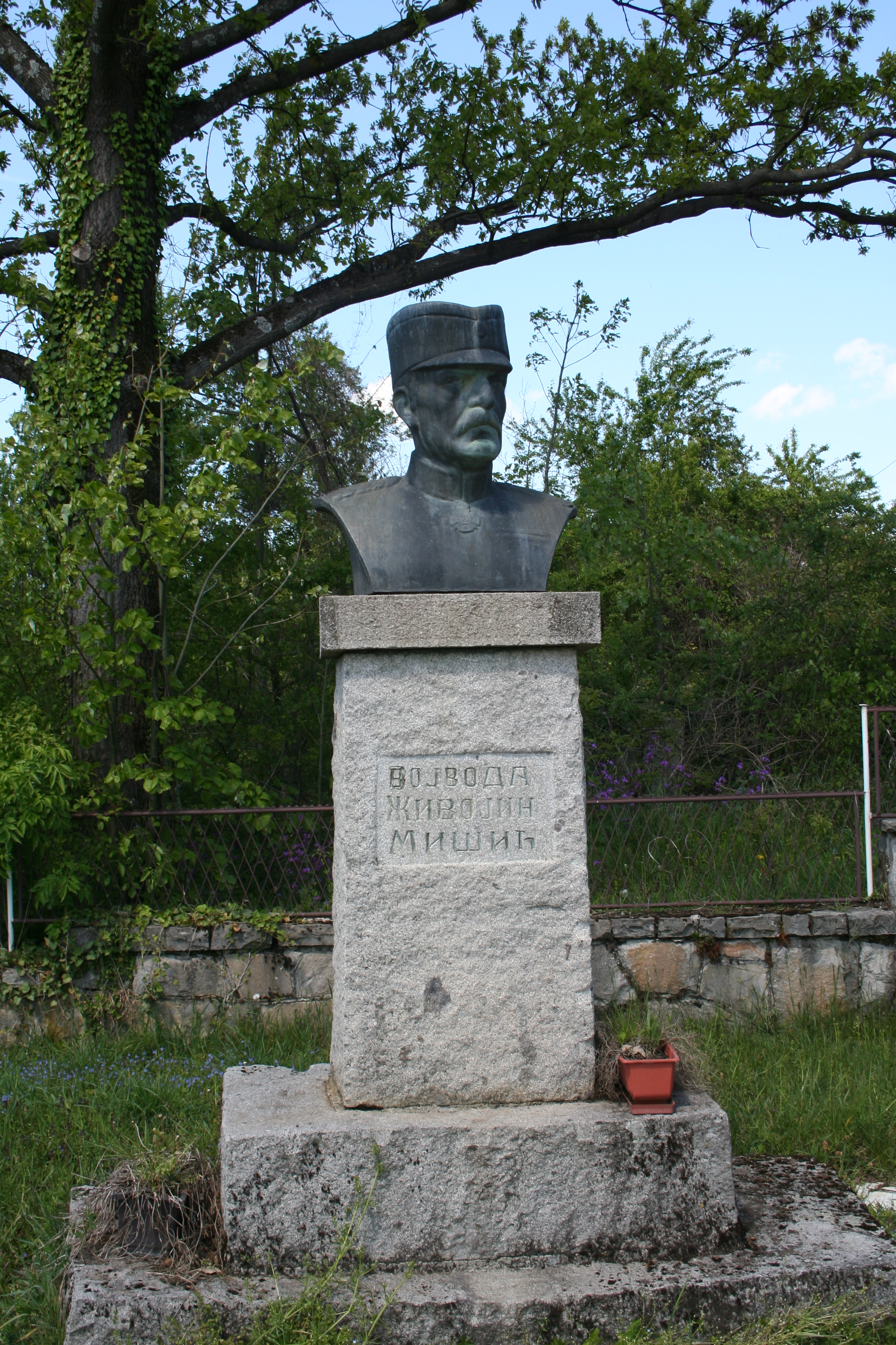 Spomen bista vojvode Živojina Mišića u Struganiku